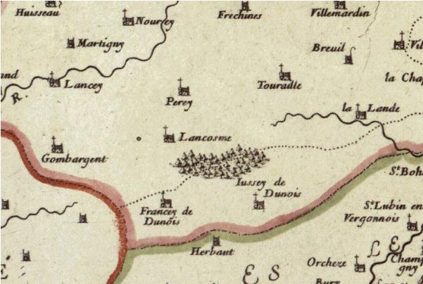 Extrait de la carte de Nicolas Sanson, datée de 1660, centrée sur la commune de Lancôme (Loir-et-Cher). Carnutes. Partie méridionale de l'évesché de Chartres [Image fixe numérisée] : Balliages de Blois et de Vendosme. Eslections de Chateaudun de Vendosme et de Blois / par le Sr Sanson d'Abbeville,... Cote : Ge DD 2987 (280, II) BNF Richelieu Cartes et Plans Reprod. Sc 86/150